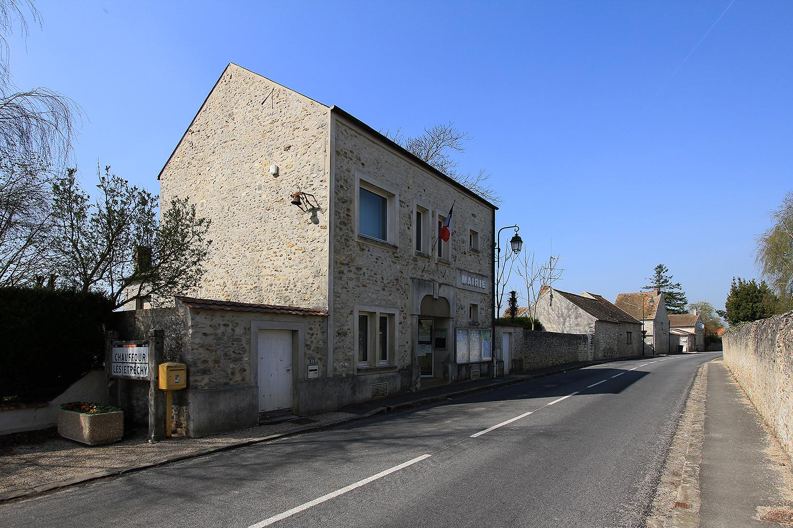 Marie de Chauffour lès Etrechy